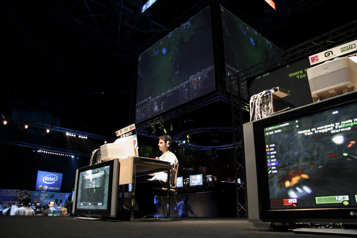 matr0x na ESWC w Paryżu